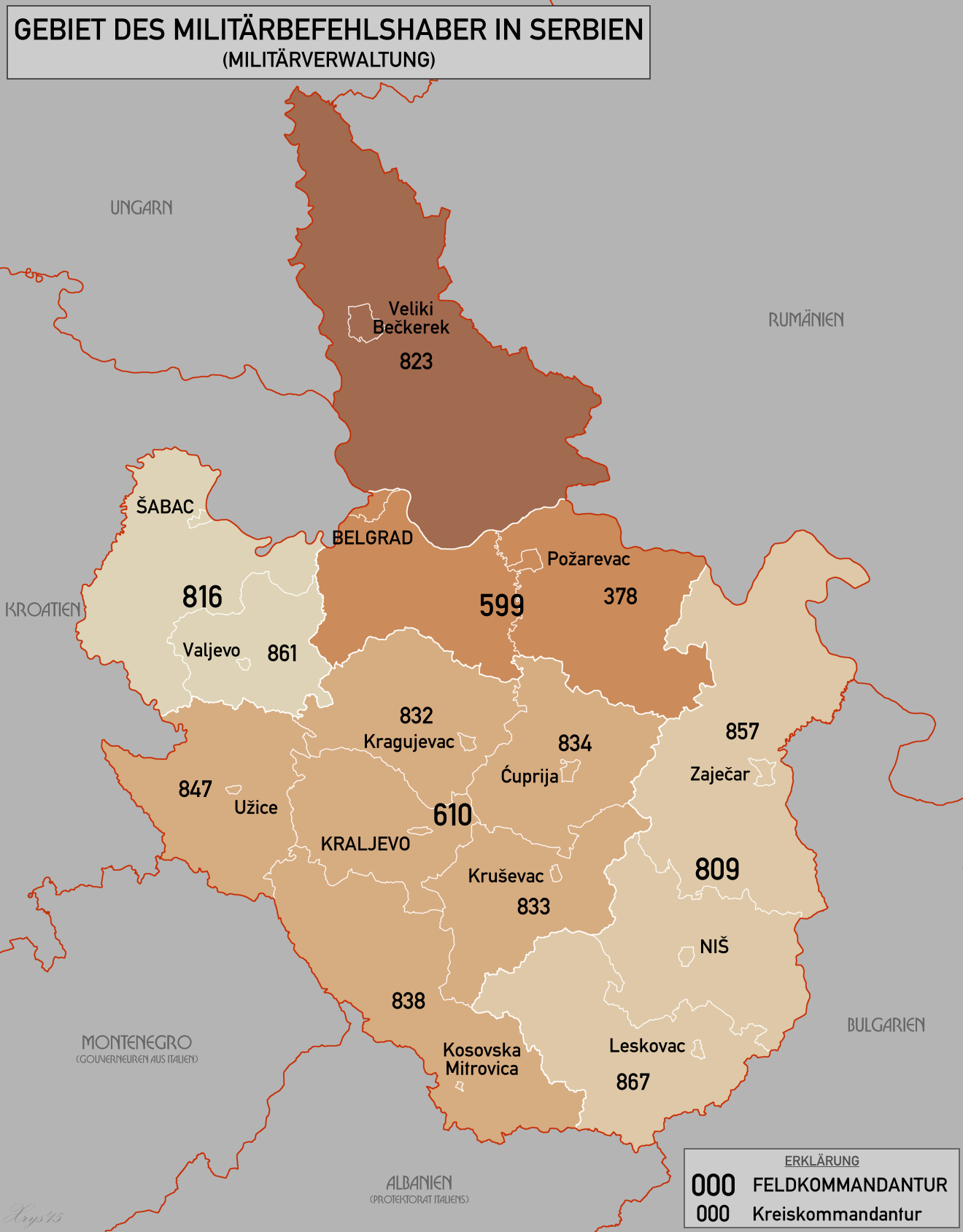 Karte des Gebiet des Militarbefehlshaber in Serbien 1941-45. Militarverwaltungs Kommandanturen. Quelle; Wilfried Krallert, 200k Volkstumskarte Jugoslawien, Wien (1941).